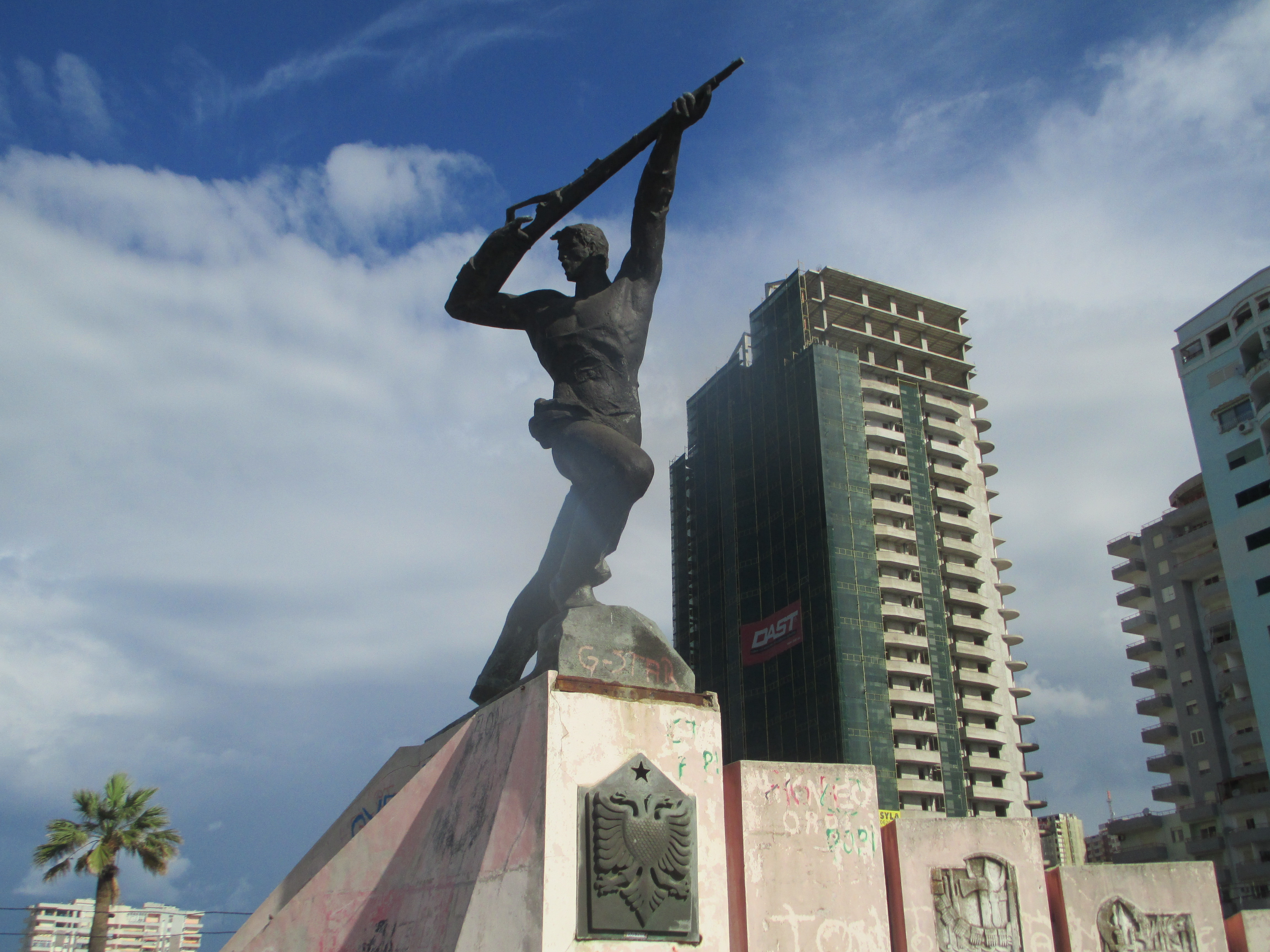 אנדרטה לפרטיזן האלמוני בדורס, אלבניה